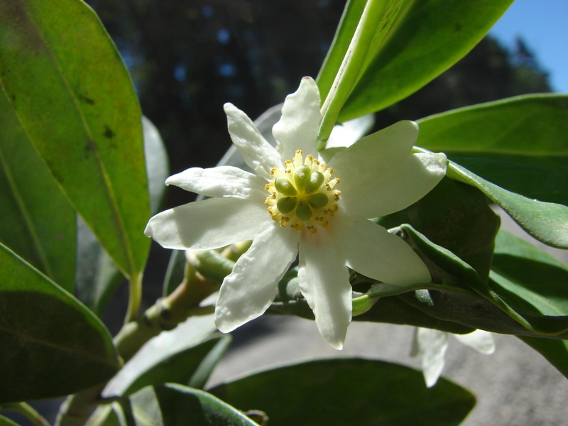 Puesco, Parque Nacional Villarrica